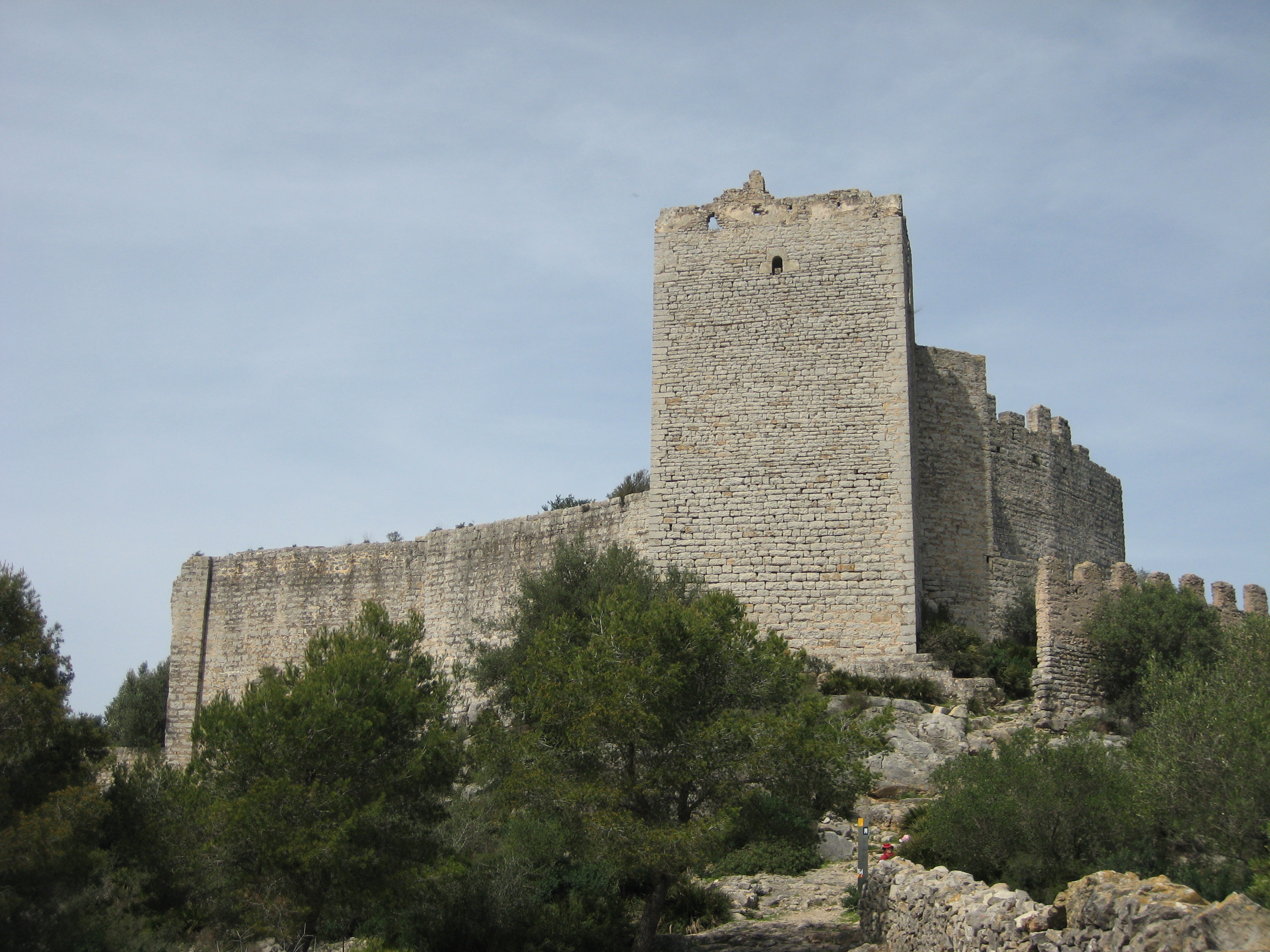 Castell de Polpís des del SE, amb la torre de l'Homenatge al centre, al municipi de Santa Magdalena de Polpís (Baix Maestrat)